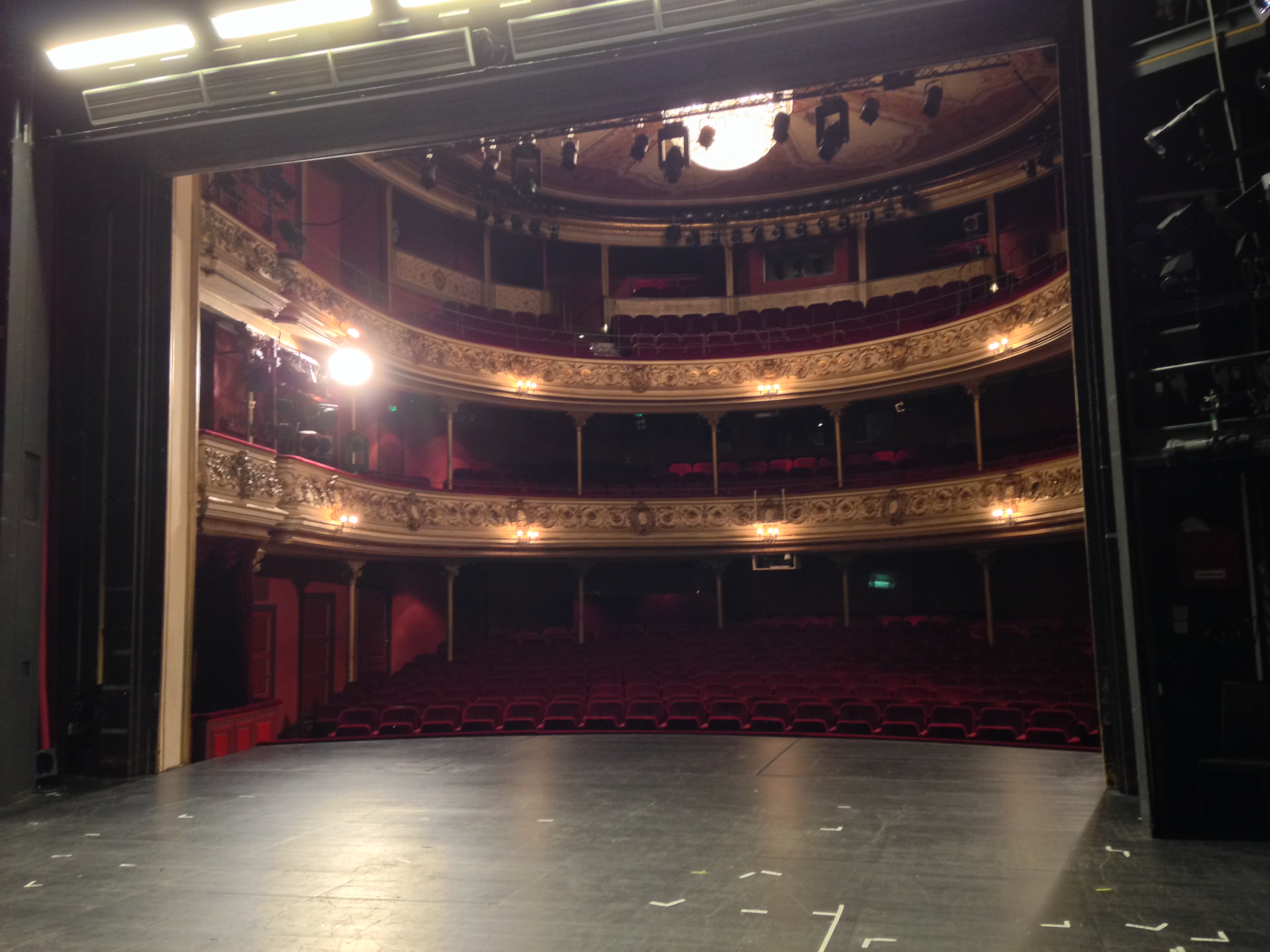 Theatersaal Großes Haus, Deutsches Theater Göttingen